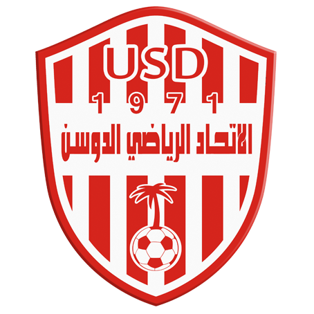 يمثل هذا ملف شعار لنادي